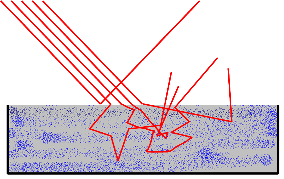 prinsipp for diffus reflektansmålinger i infrarød spektroskopi